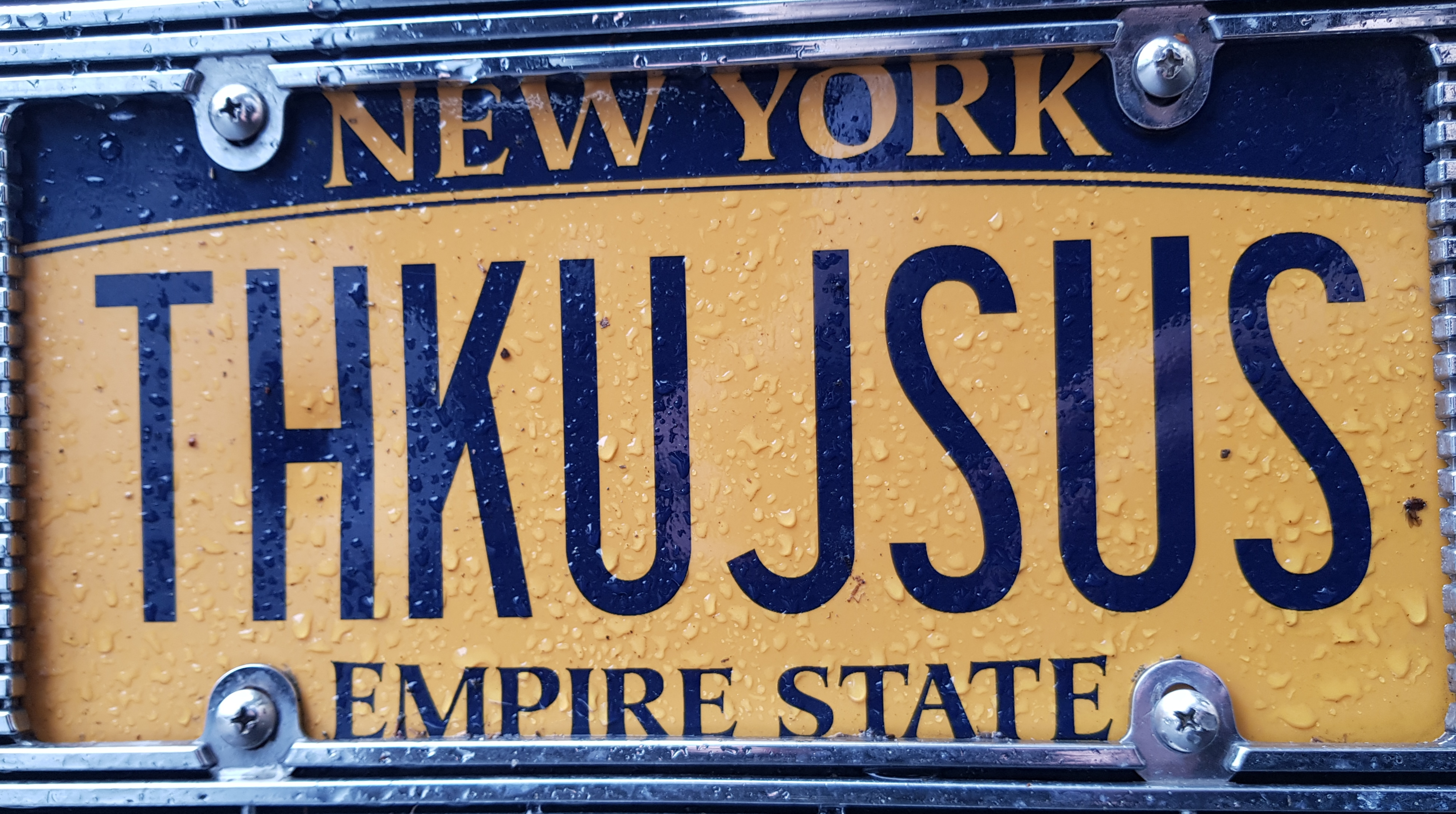 לוחית רישוי בהזמנה אישית